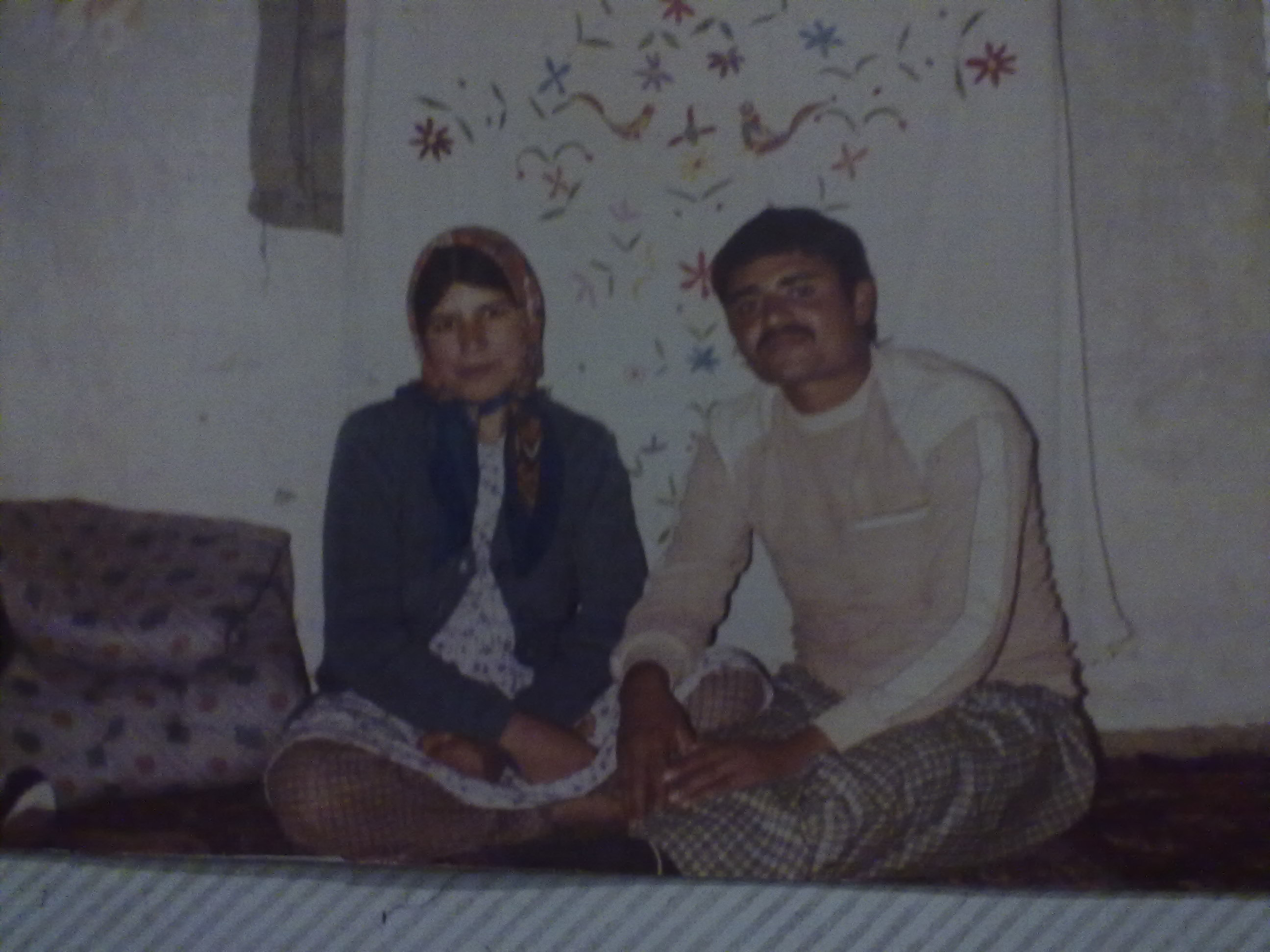 صفا و سادگی نسل جدید